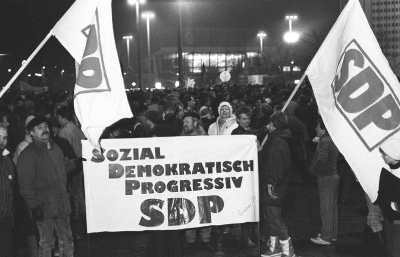 ADN-ZB-Gahlbeck/8.1.90/Leipzig: Montagsdemonstration/ Über 100 000 fanden sich auf dem Karl-Marx-Platz ein. Ebenso wie die SDP warben auch andere Parteien und Bewegungen für ihre Politiik.